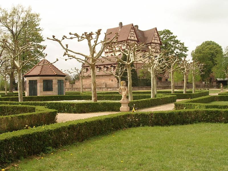 Schloss Neunhof mit dem achsensymmetrisch angelegten Barockpark, von Nordosten